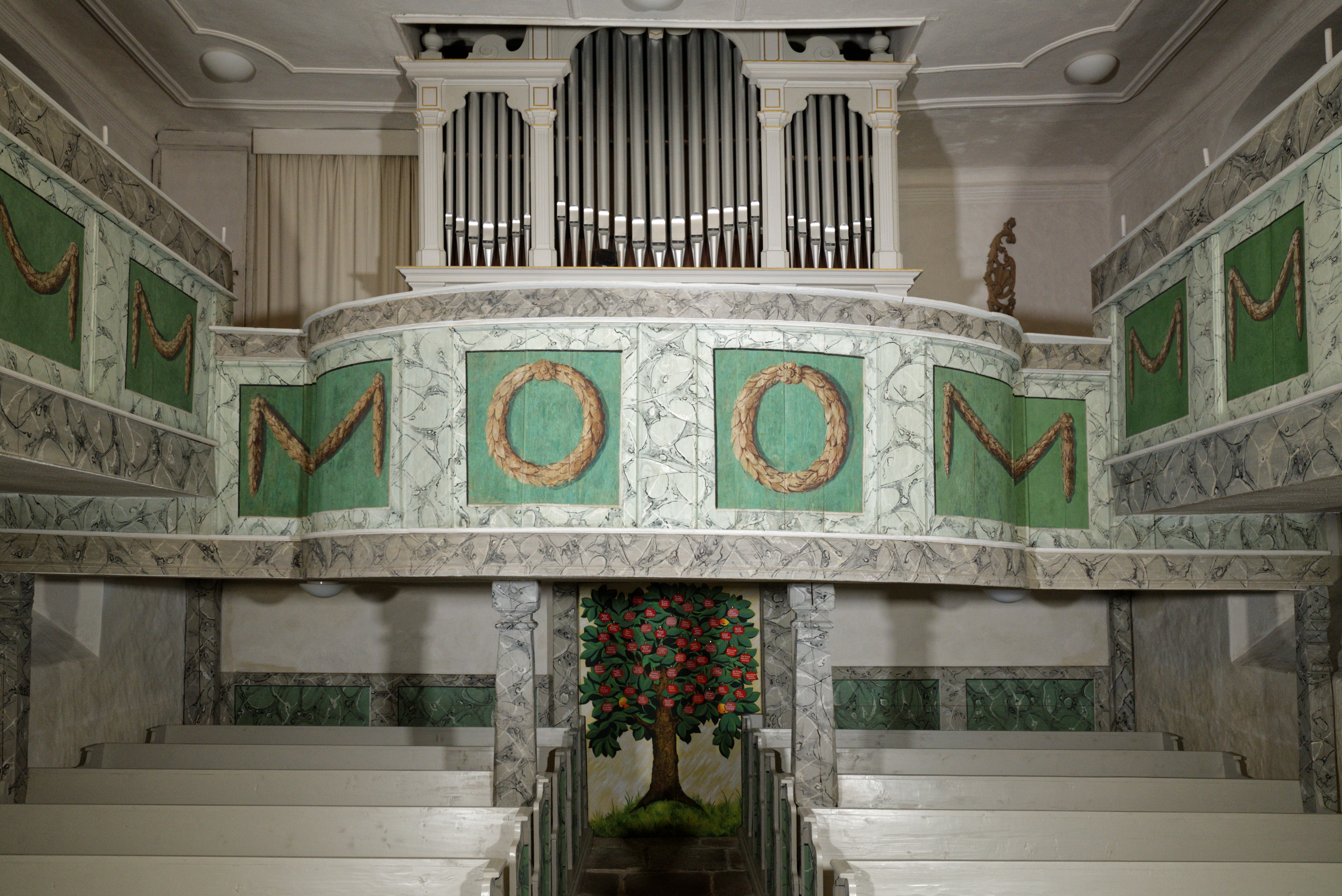 Ansicht der Orgelempore, restauriert 2016